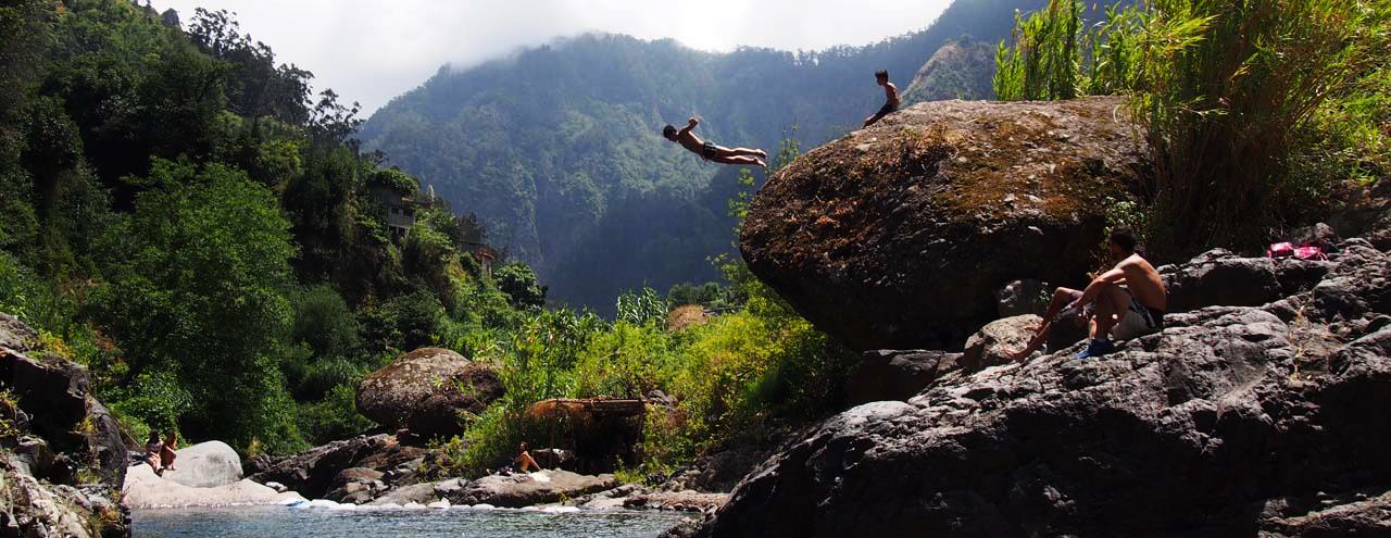 Poço dos chefes Fonte: Junta de Freguesia do Curral das Freiras